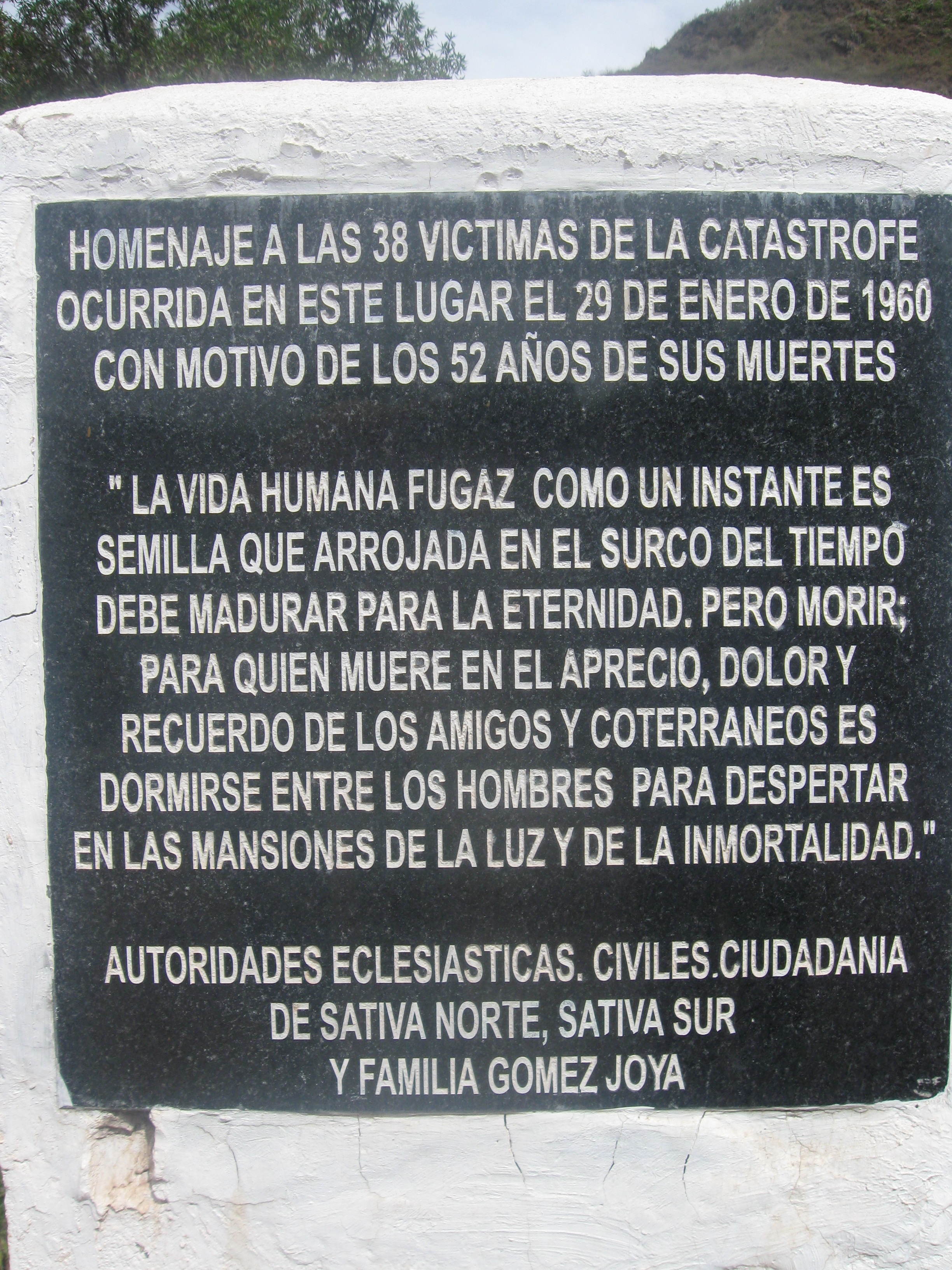 Placa que recuerda la tragedia de enero de 1960 en Sativanorte